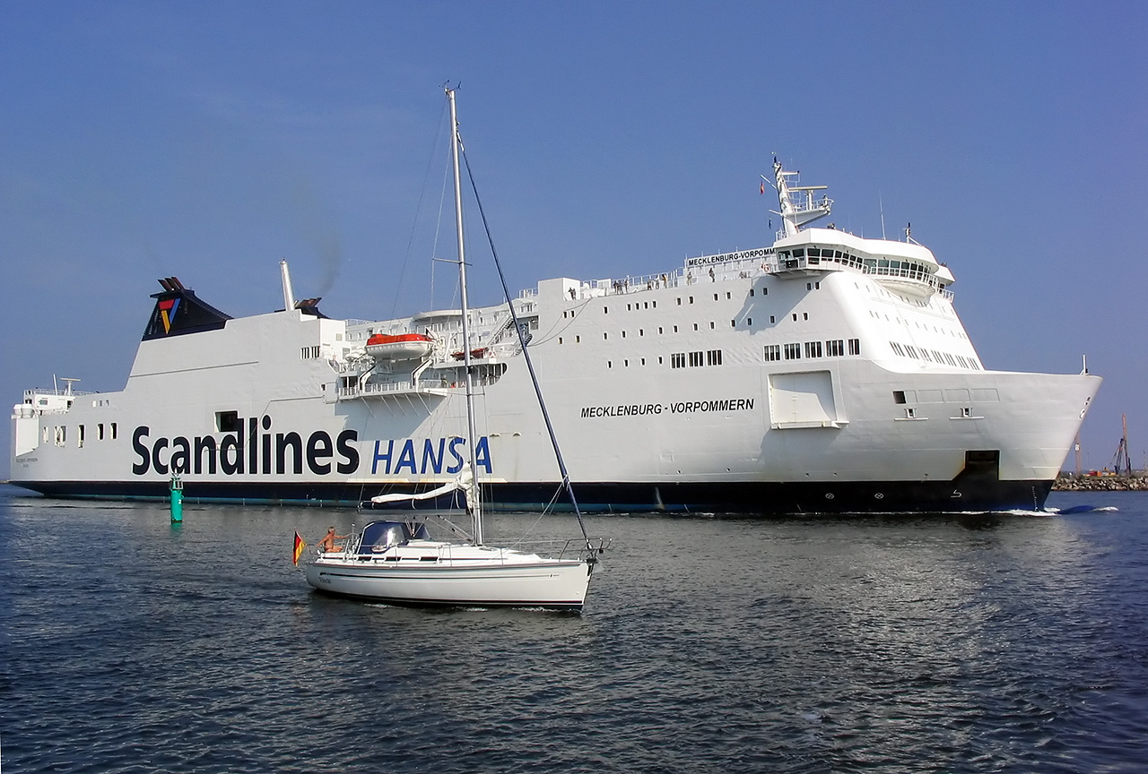 Fähre Mecklenburg-Vorpommern Indienststellung: 14. Dezember 1996 Heimathafen: Rostock Passagiere: 600 Länge/Breite: 199,9 m / 28,8 m Geschwindigkeit: max. 22,5 Knoten Linie: Trelleborg - Rostock